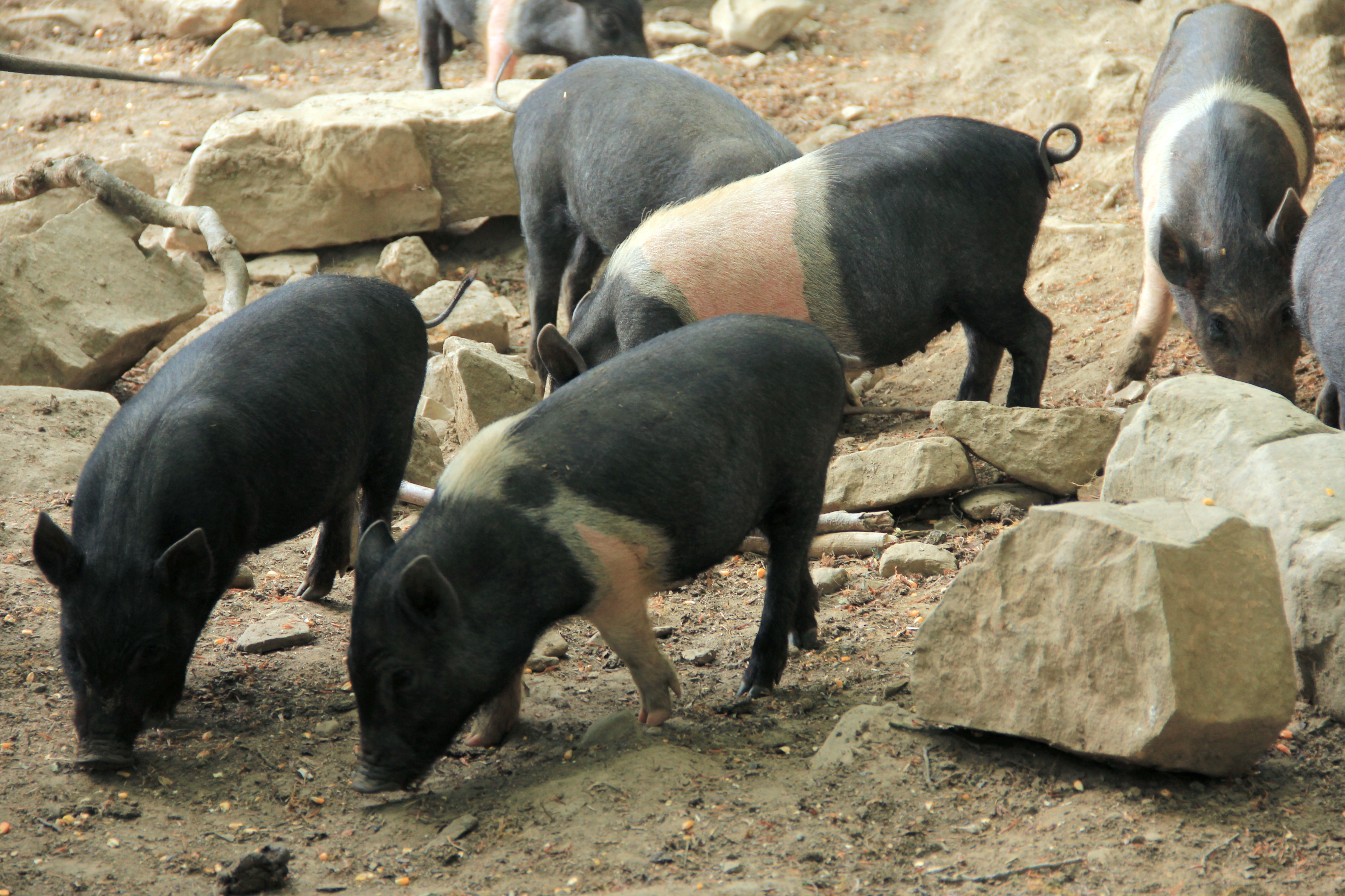 Suini Cinta Senese - Italia.